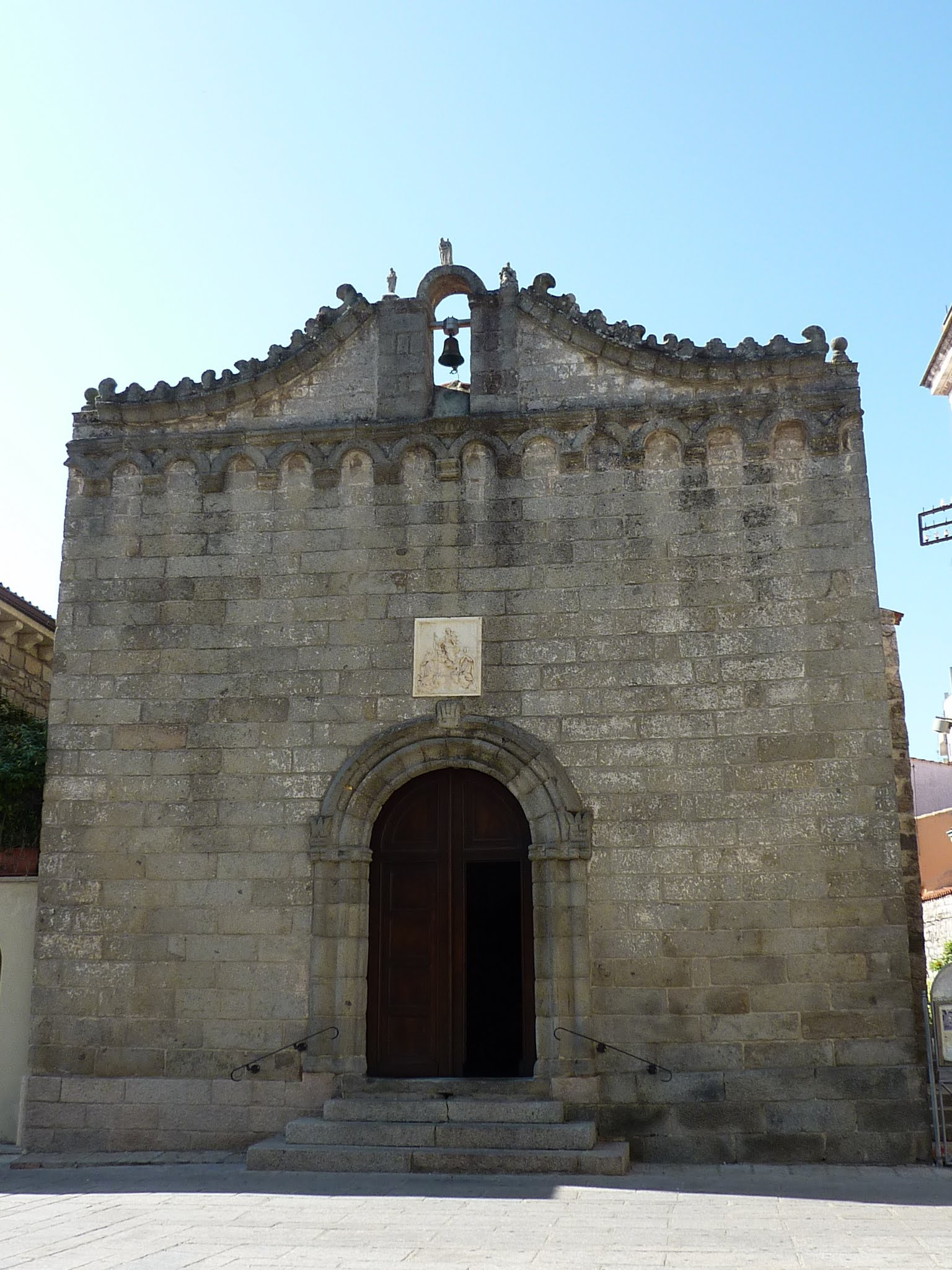 Oratorio del Rosario di Tempio Pausania